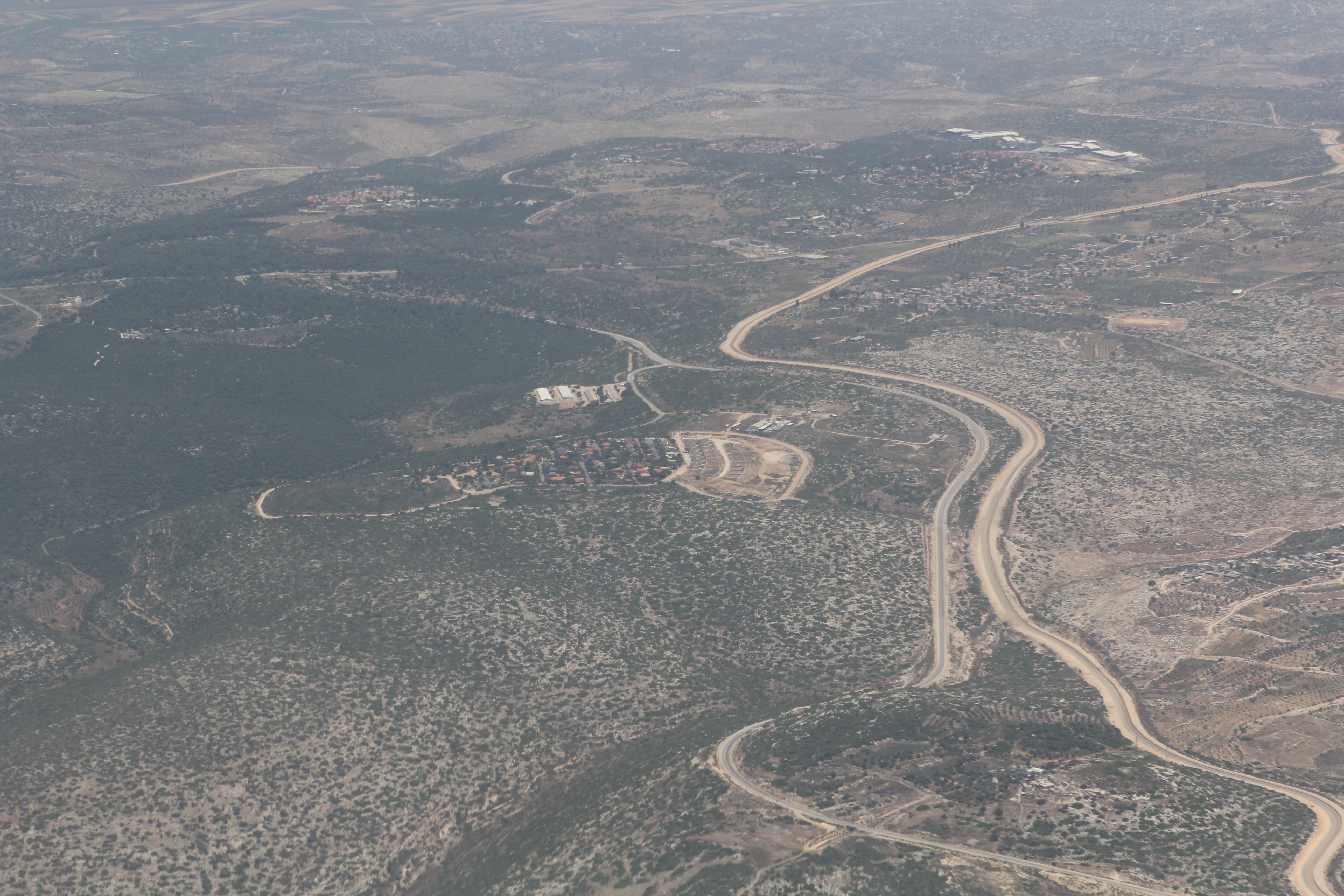 צילום אוויר של ריחן